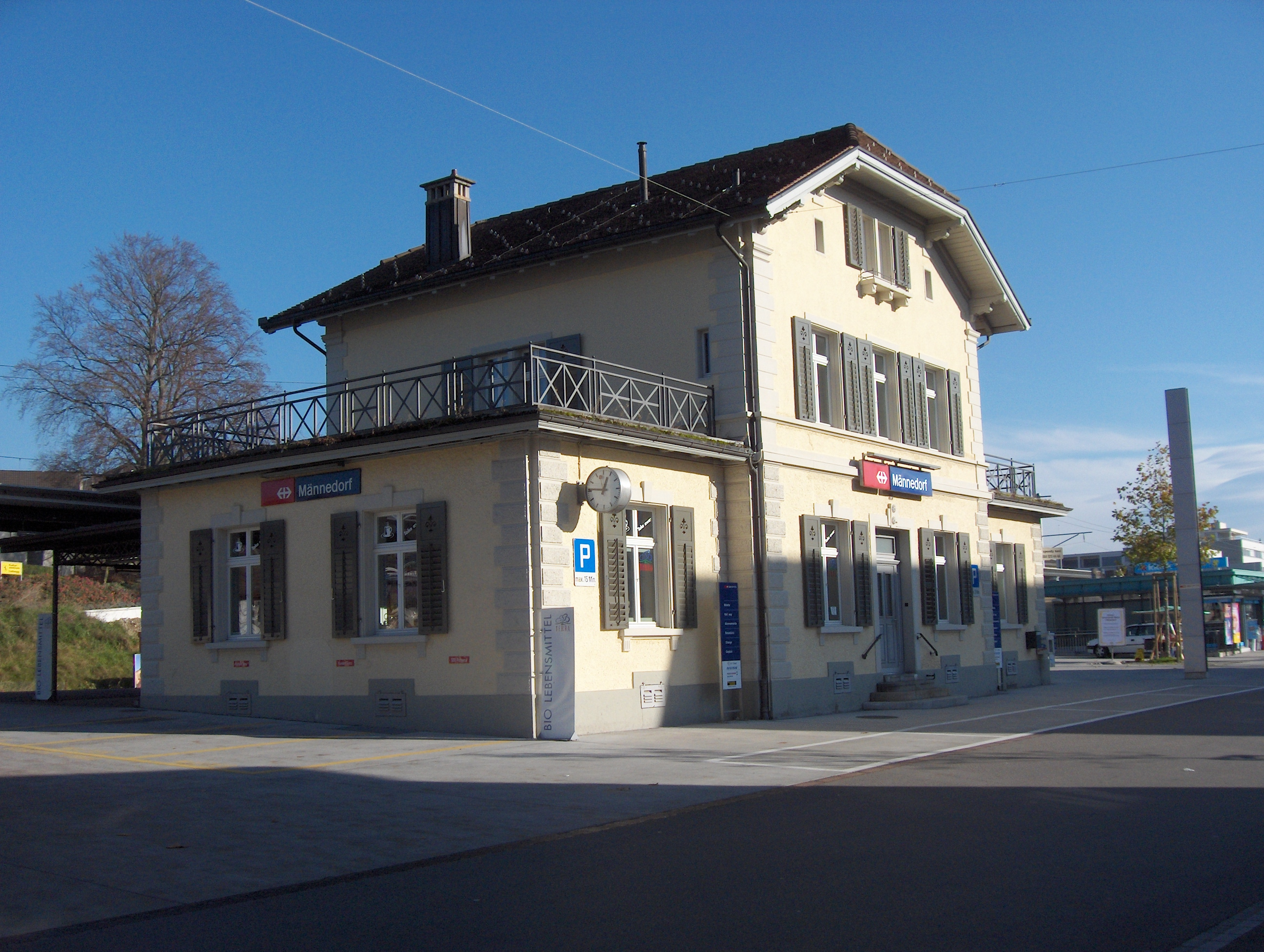 Bahnhof von Männedorf, Schweiz